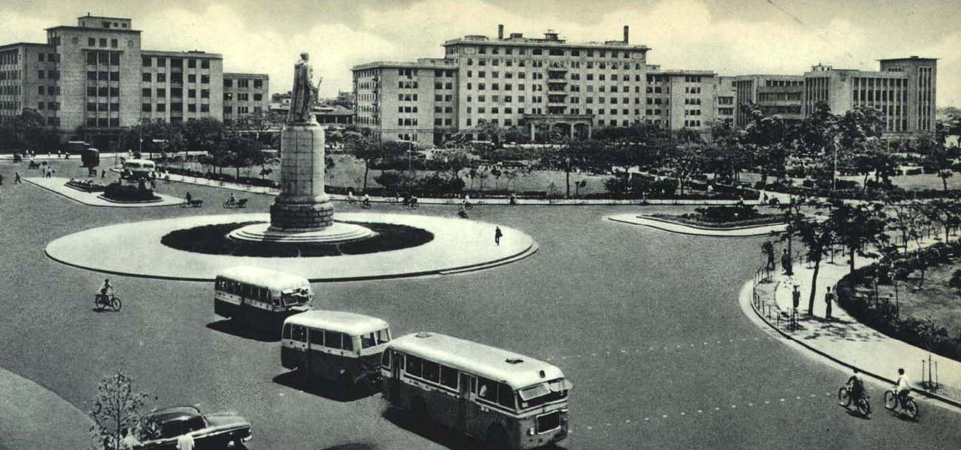 1963-08 1963年 珠海丹心